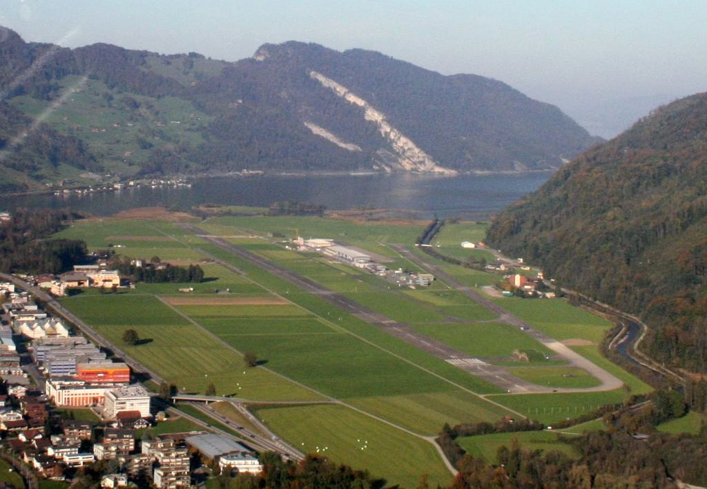 Flugplatz Alpnach, Luftaufnahme, Kanton Obwalden, Schweiz